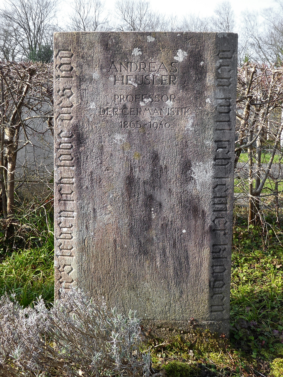 Andreas Heusler (1865–1940) Altgermanist, Heuslersche Notation, Heuslersches Gesetz, Inhaber eines für ihn geschaffenen Lehrstuhls an der Univ. Basel. Grab auf dem Friedhof Hörnli, Riehen, Basel-Stadt